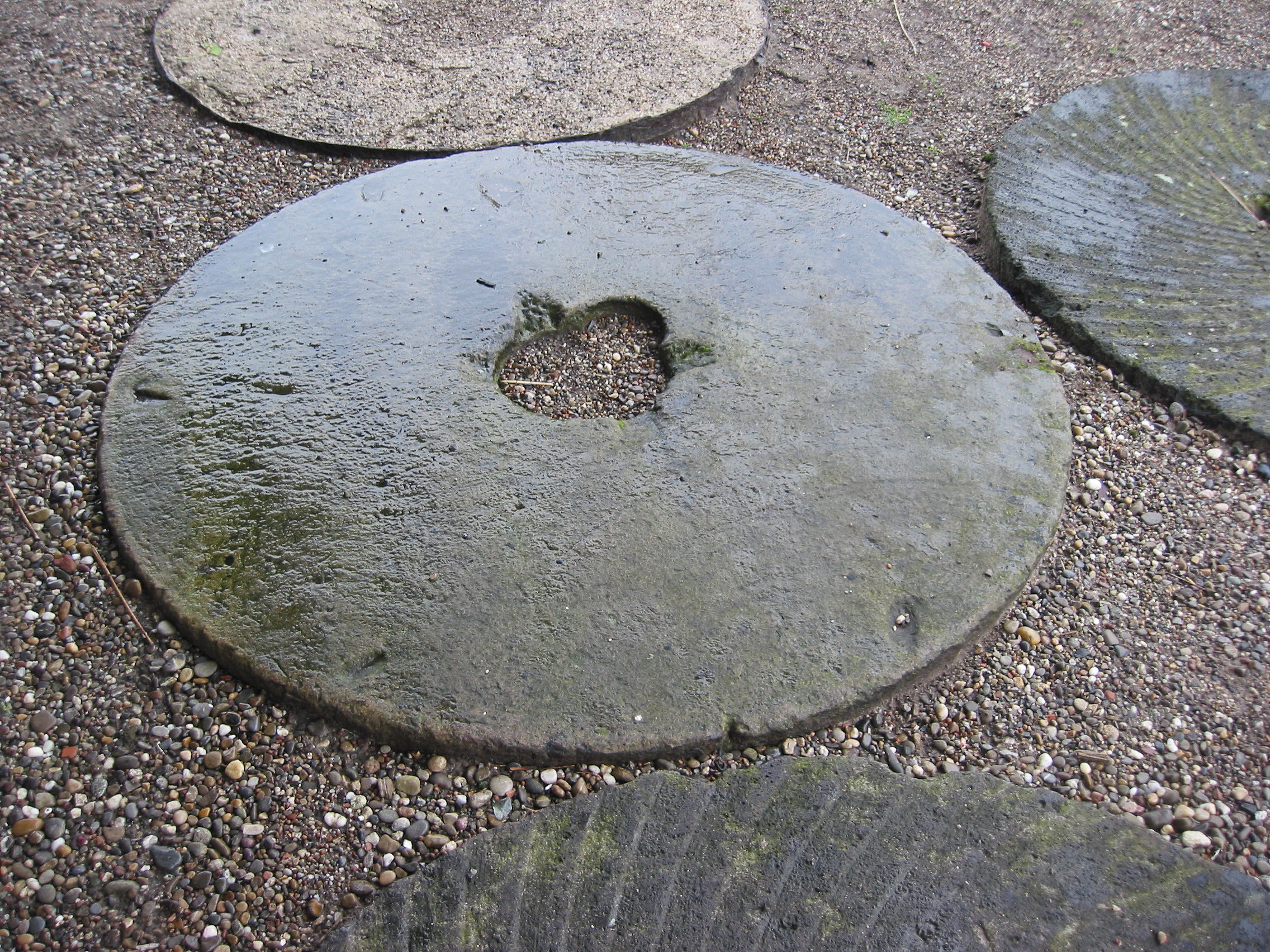 De Hoop Garderen pelsteen